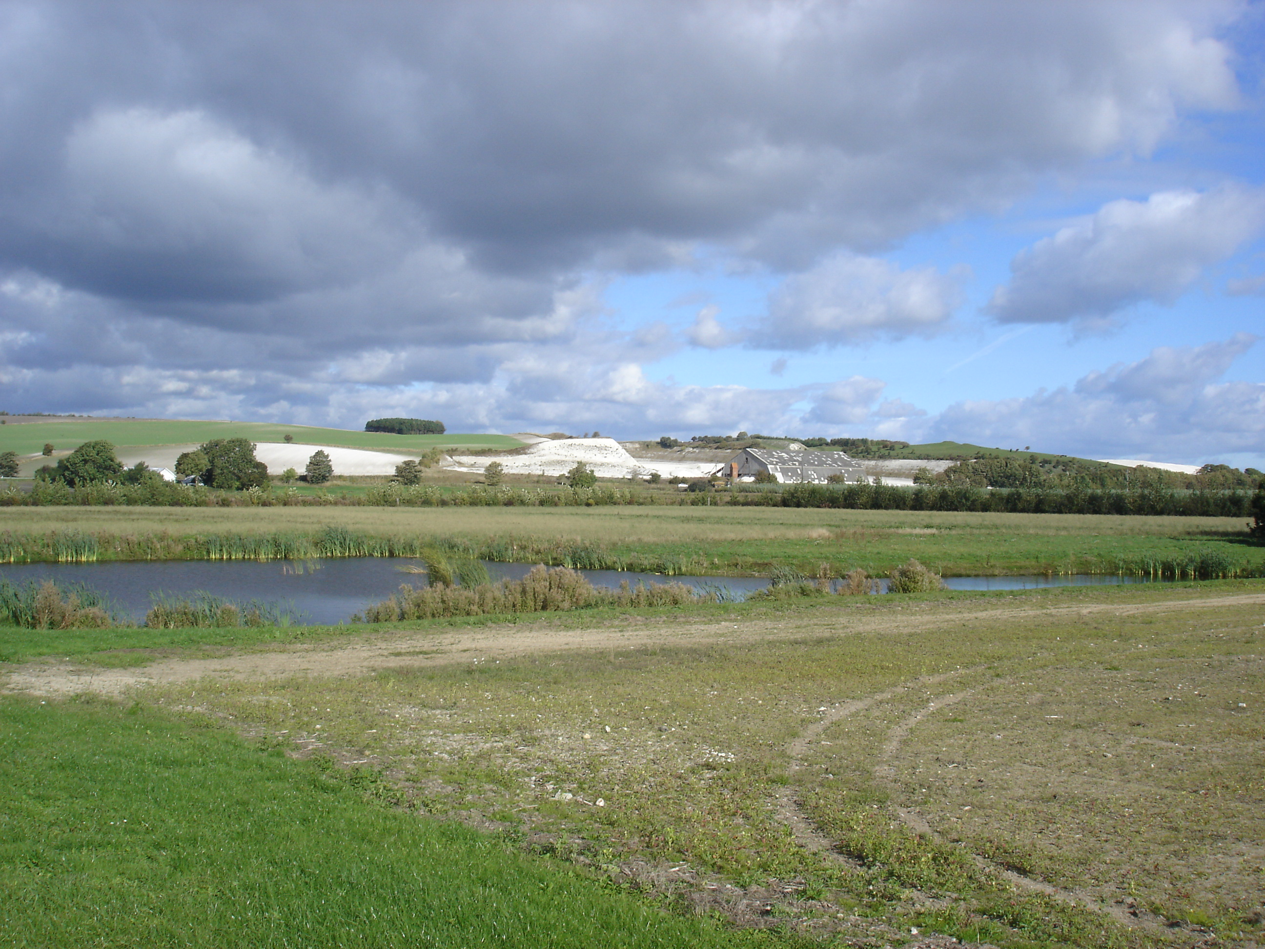 Kalklejerne Ø for Kongerslev